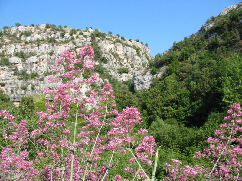 La Valle dell'Anapo, Pantalica (Sicilia)